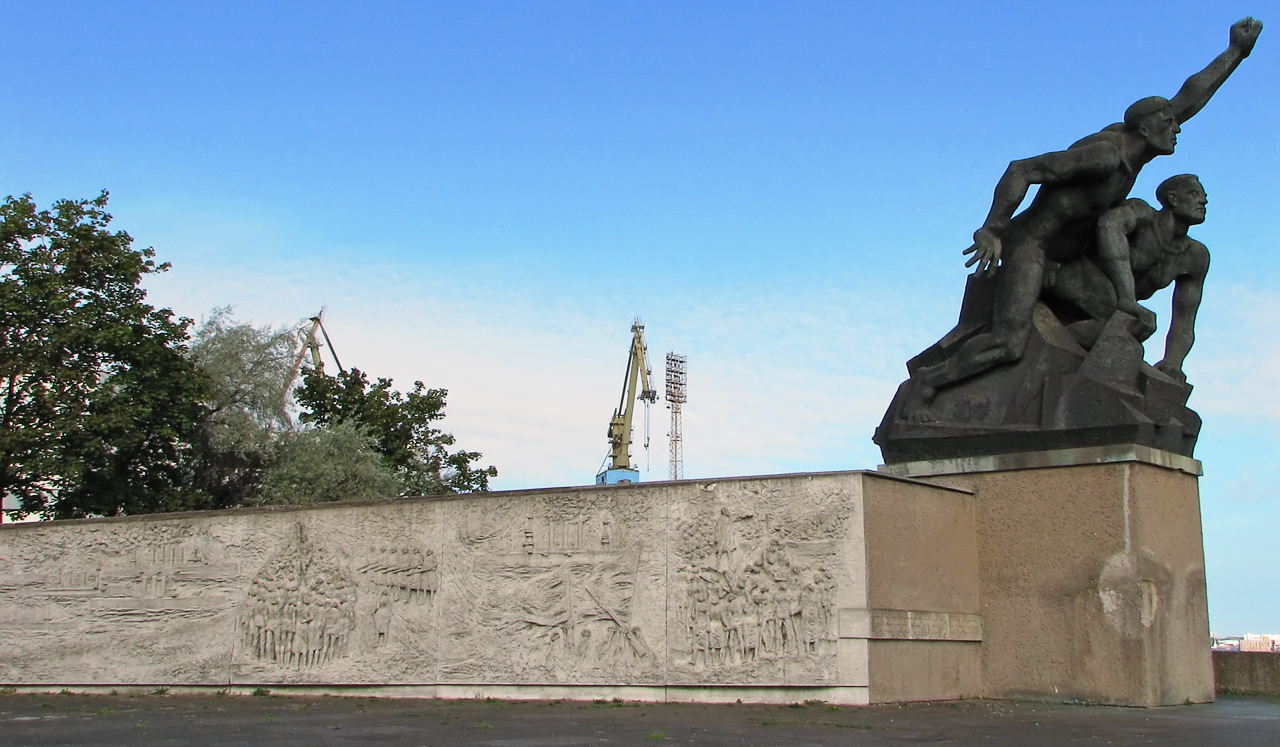 Beschreibung: Gedenkstätte revolutionärer Matrosen in Rostock / Ende des Stadthafens Fotograf: Darkone, 31. August 2005